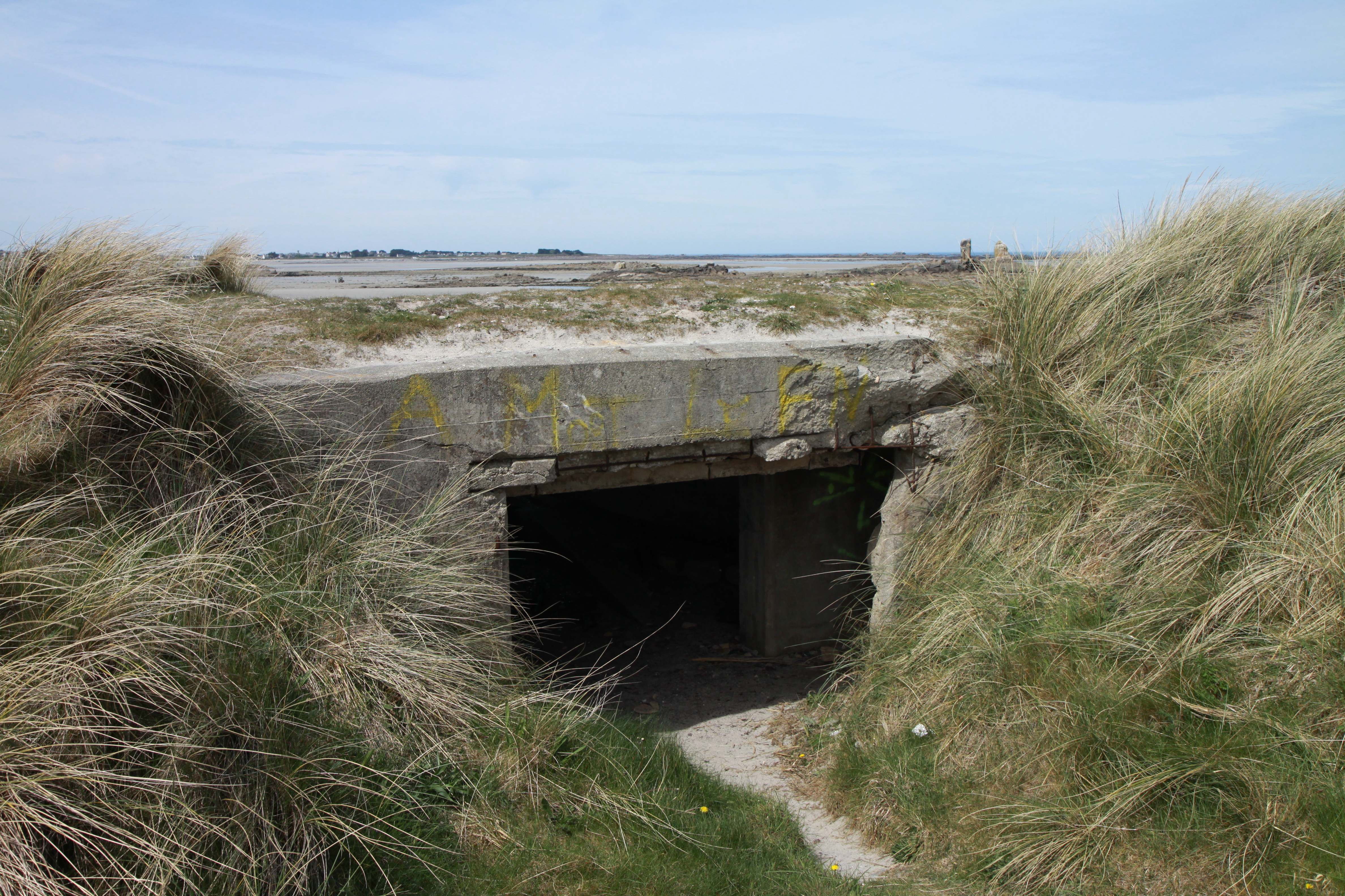 Un blockhaus dans les dunes de Keremma.